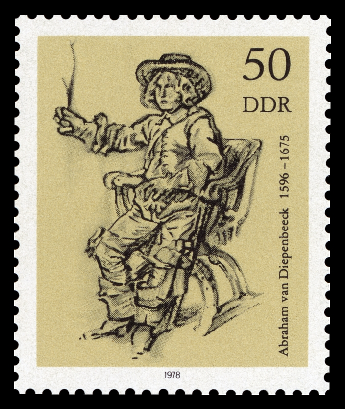 Information: Kupferstichkabinett der Staatlichen Museen Berlin: Zeichnungen: „Sitzender Mann im Lehnstuhl“; von Abraham von Diepenbeeck Ausgabepreis: 50 Pfennig First Day of Issue / Erstausgabetag: 25. Juli 1978 Auflage: 2.100.000 Entwurf: Naumann Druckverfahren: Offsetdruck Michel-Katalog-Nr: Ländercode-MiNr: 2352